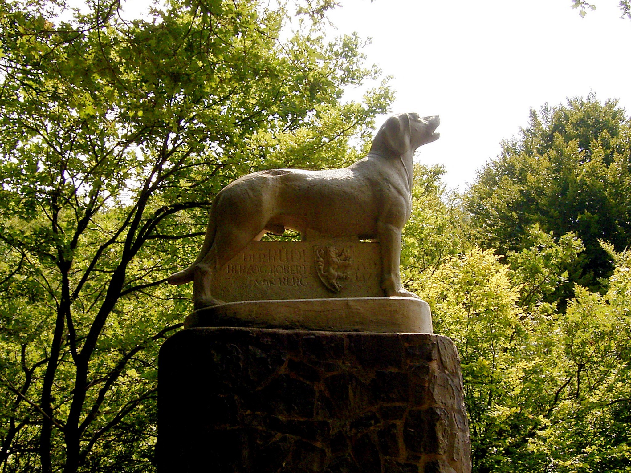 Rüdenstein in Solingen-Obenrüden